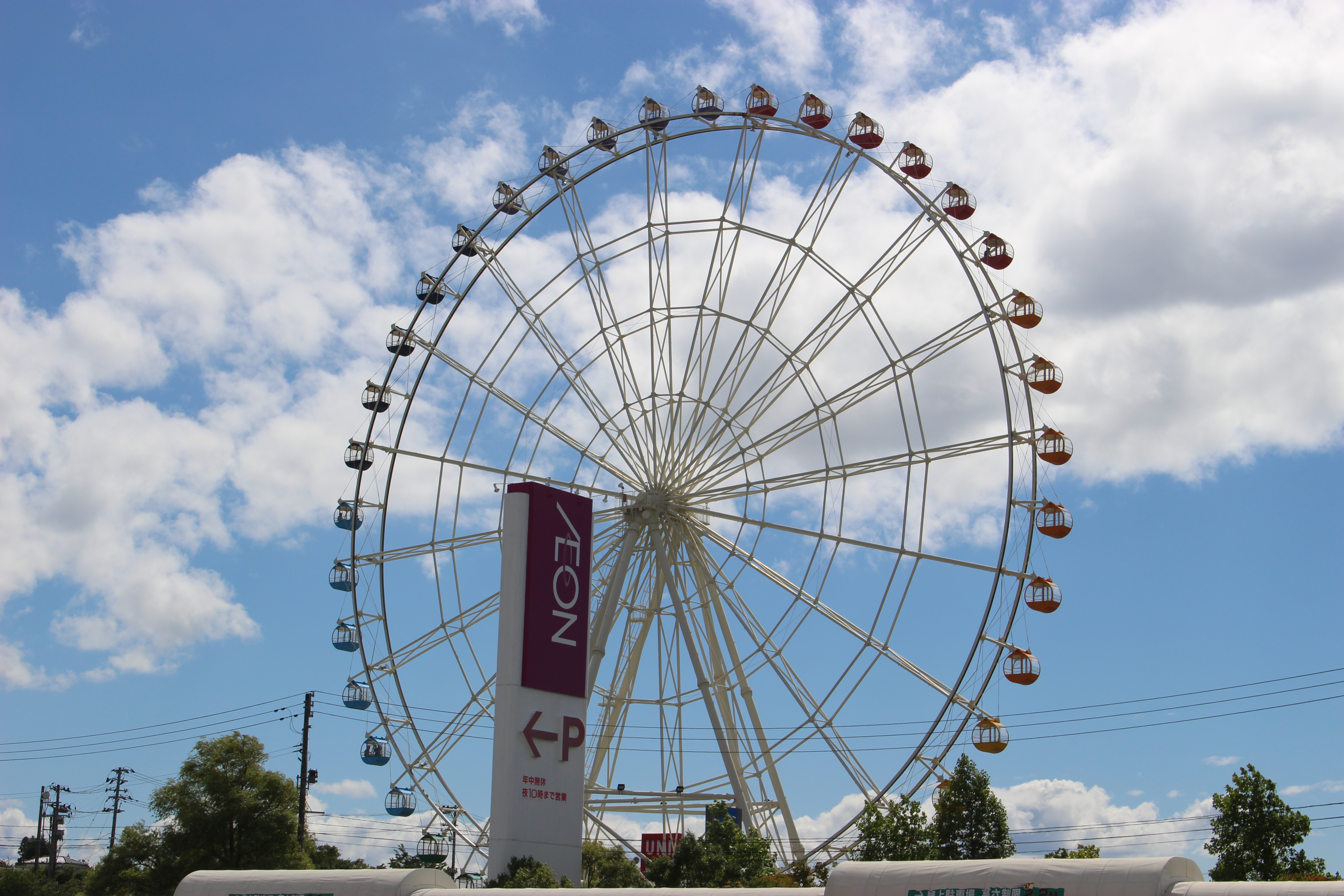 フェスタ大観覧車ビッグルーレット